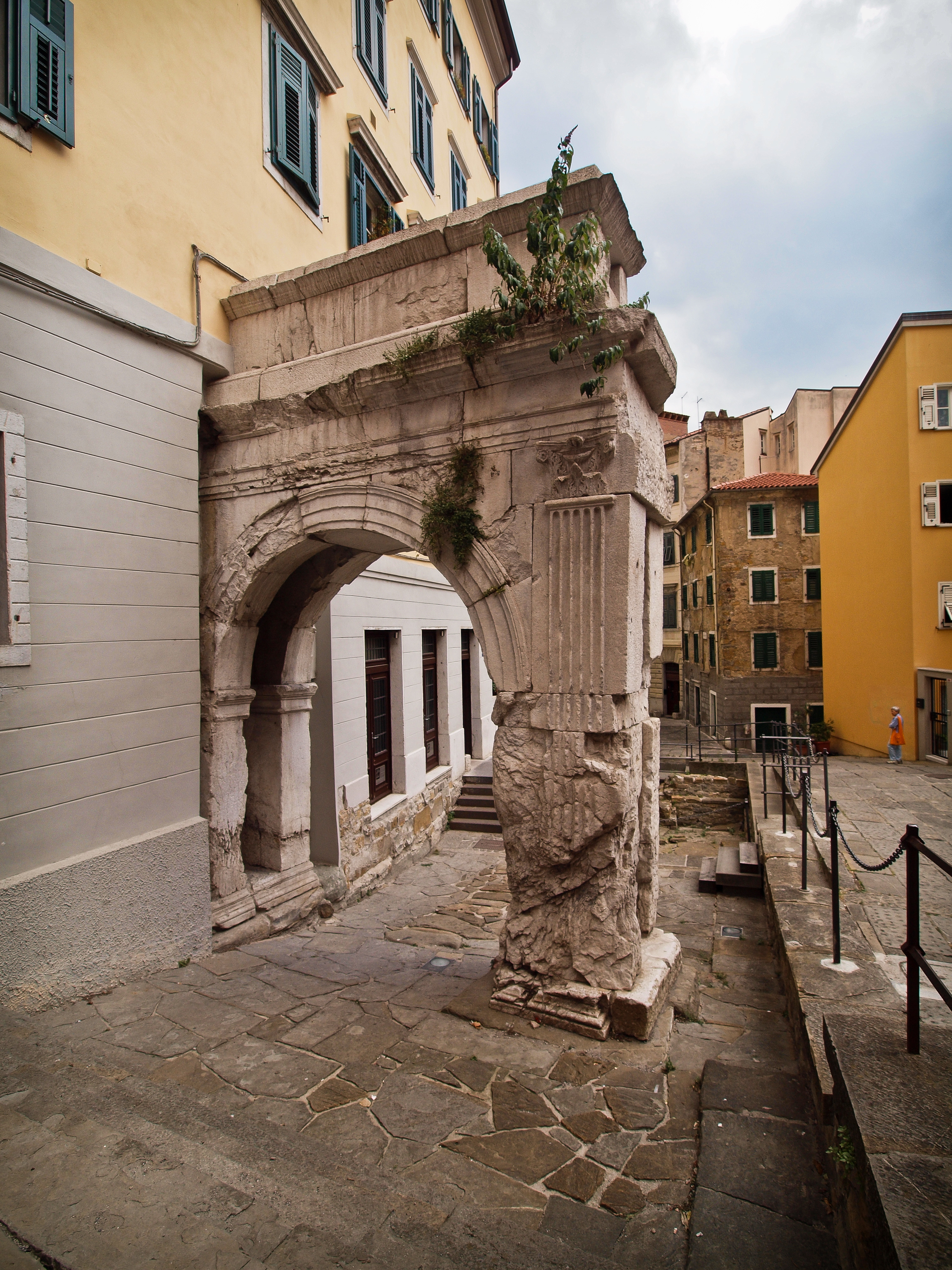 Arco romano a Trieste